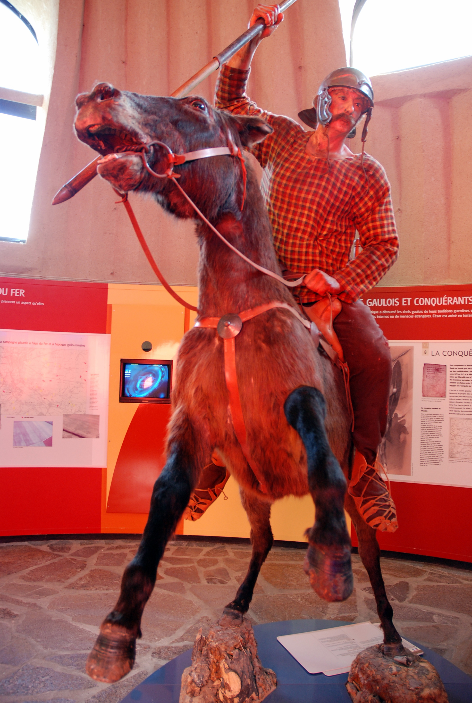 Gallo-Romeinse krijger in het Park Samara bij Amiens, Frankrijk